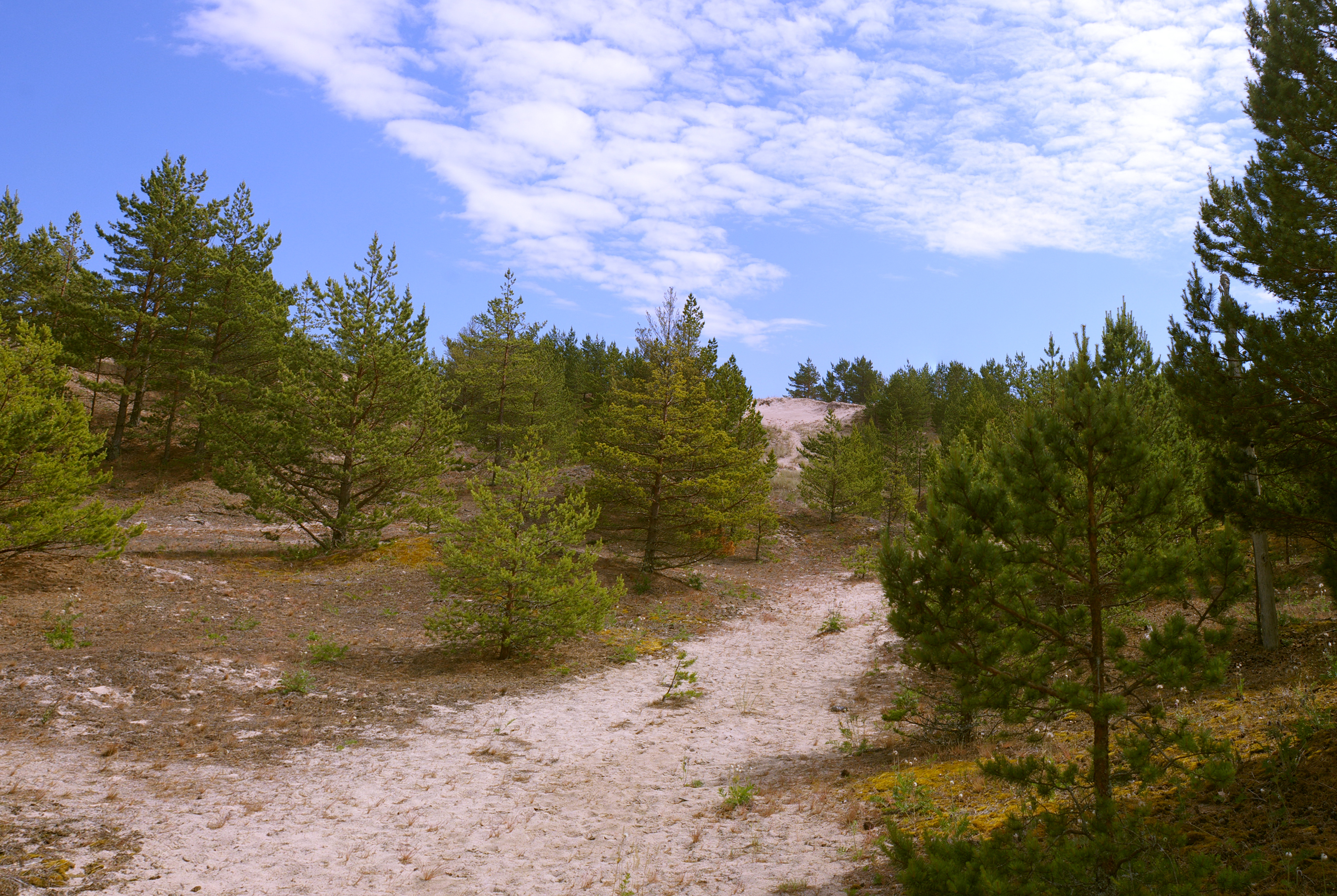 Gotska Sandon, Sweden